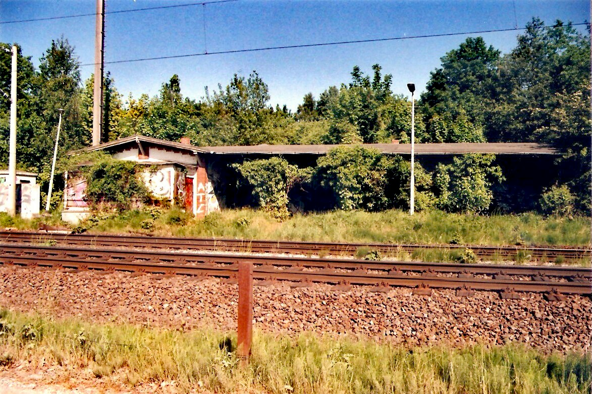 Bad Schwartaus einstiger zweiter Bahnhof Waldhalle. Er wurde am Morgen des 16. Oktober 2012 niedergebrannt und deren Ruine danach abgerissen.